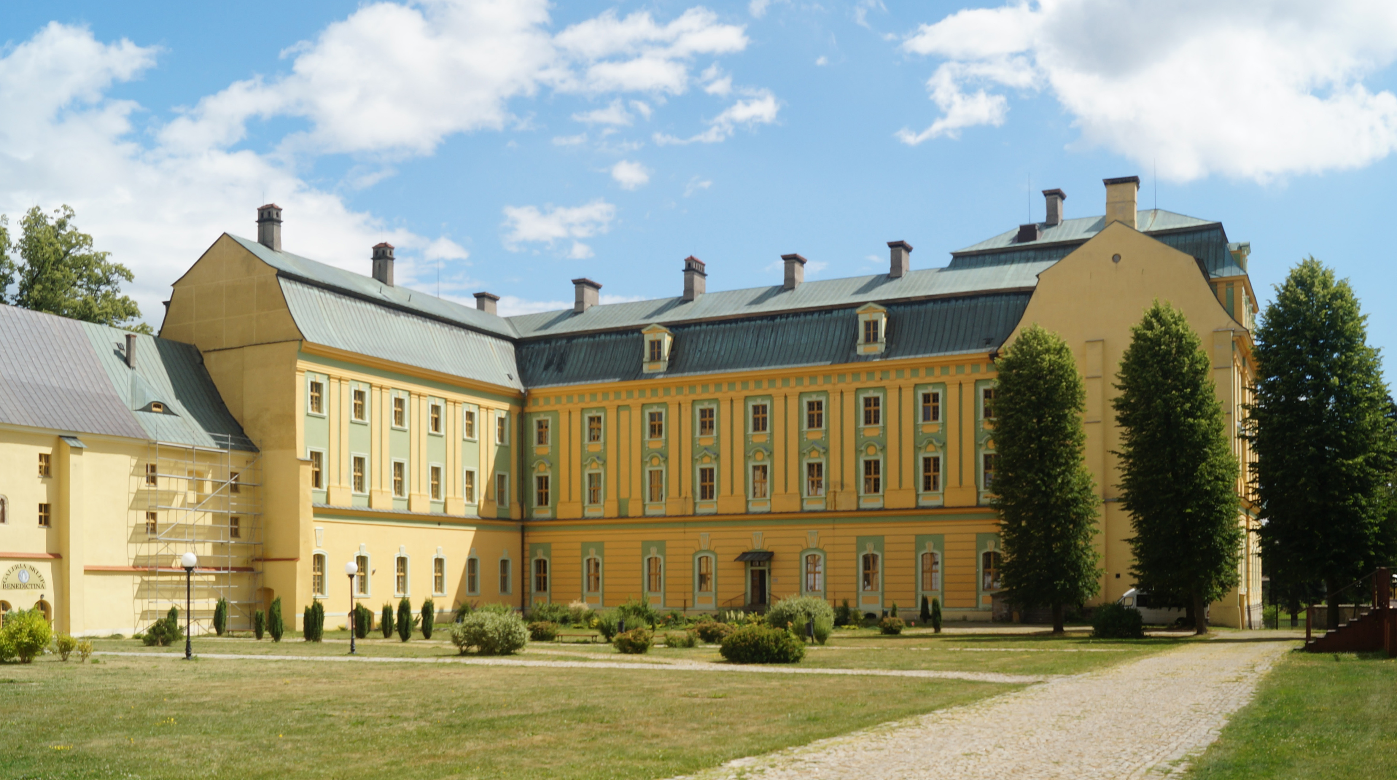 Kloster Grüssau - Klostergebäude